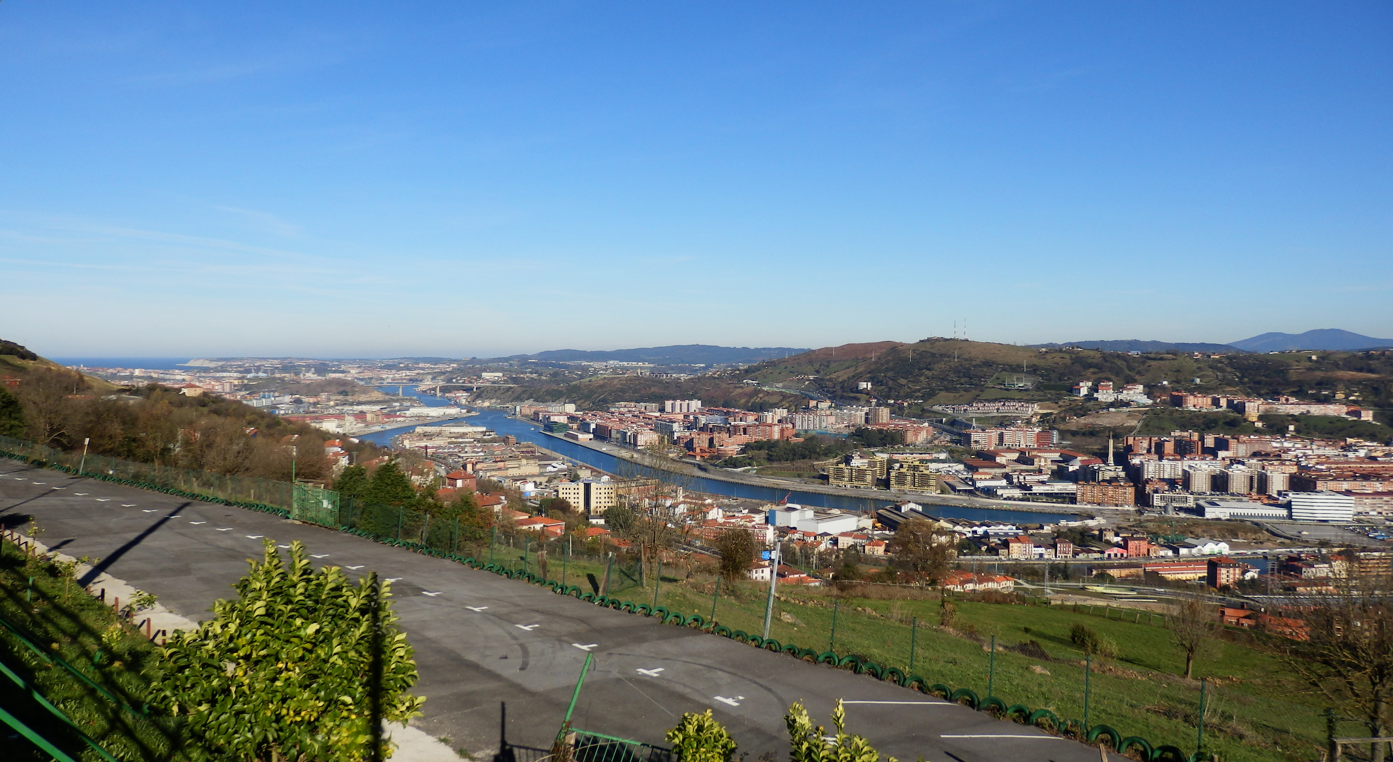 Vista en dirección norte desde el monte Kobetas de Bilbao, Bizkaia. Se aprecia el último tramo del río Nervión, ya convertido en ría, con las poblaciones situadas en sus orillas, y el mar Cantábrico en último término.